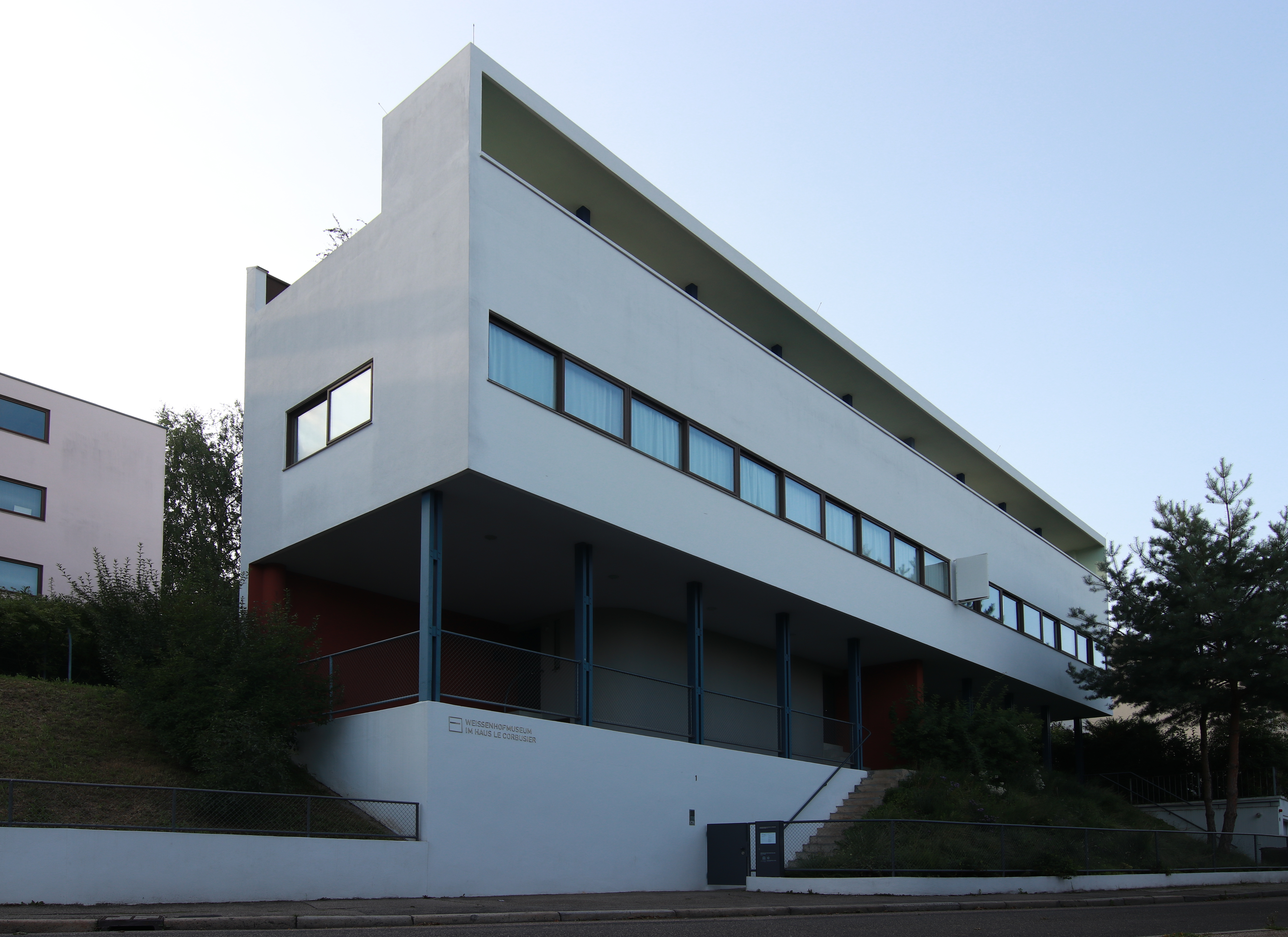 Le-Corbusier-Haus, Rathenaustraße 1 und 3 in Stuttgart. Erbaut 1927, 1981–1987 von Le Corbusier und Pierre Jeannerel. Bauhaus, Neues Bauen, Internationaler Stil. Geschützt nach § 12 DSchG.